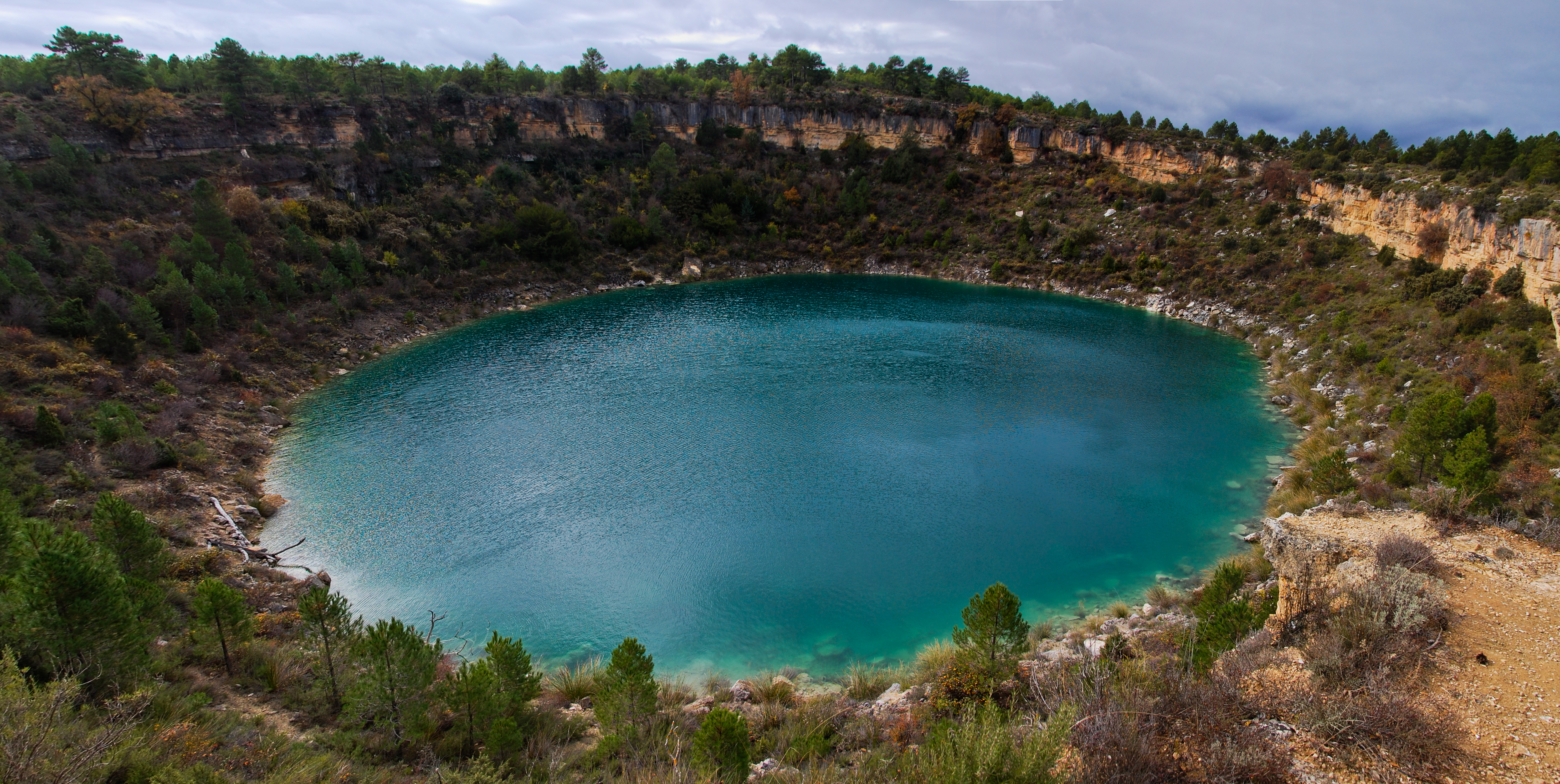 pan16_20101108 Laguna de la Parra, lagunas de Cañada del Hoyo, provincia de Cuenca, España.